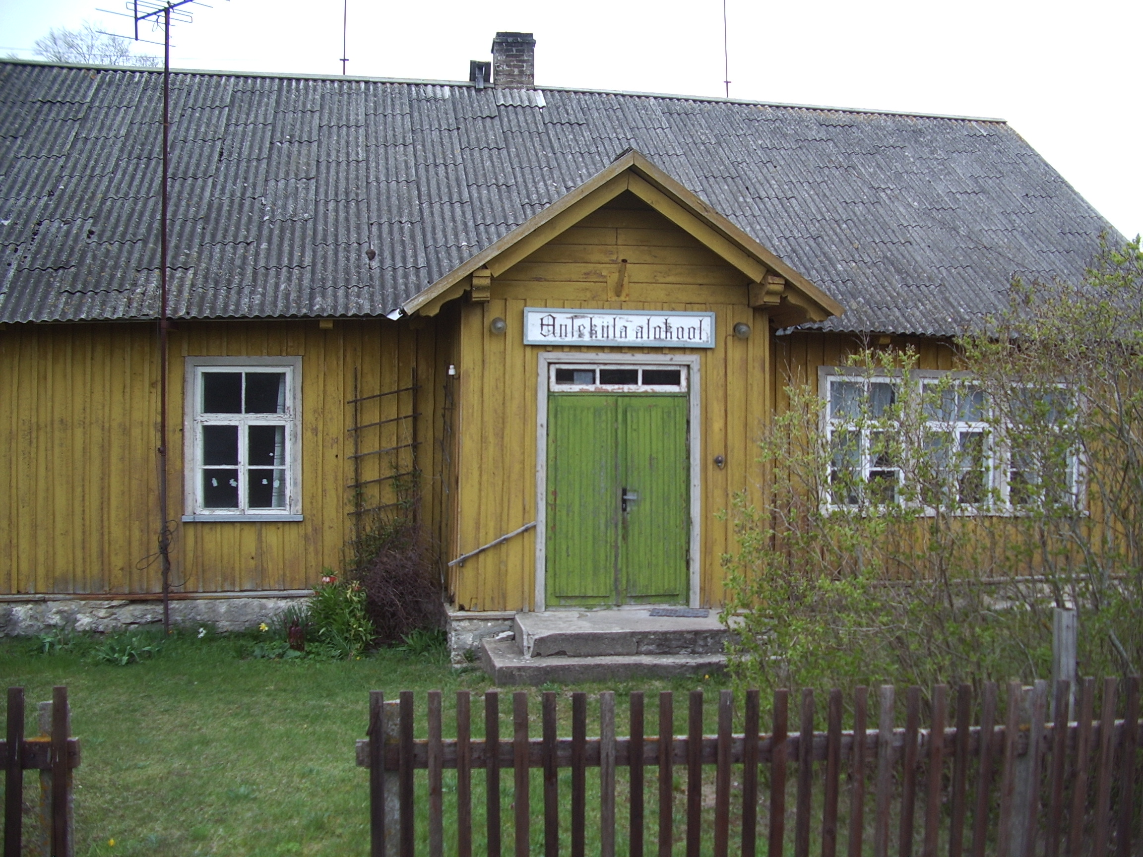 Anseküla endise algkooli hoone